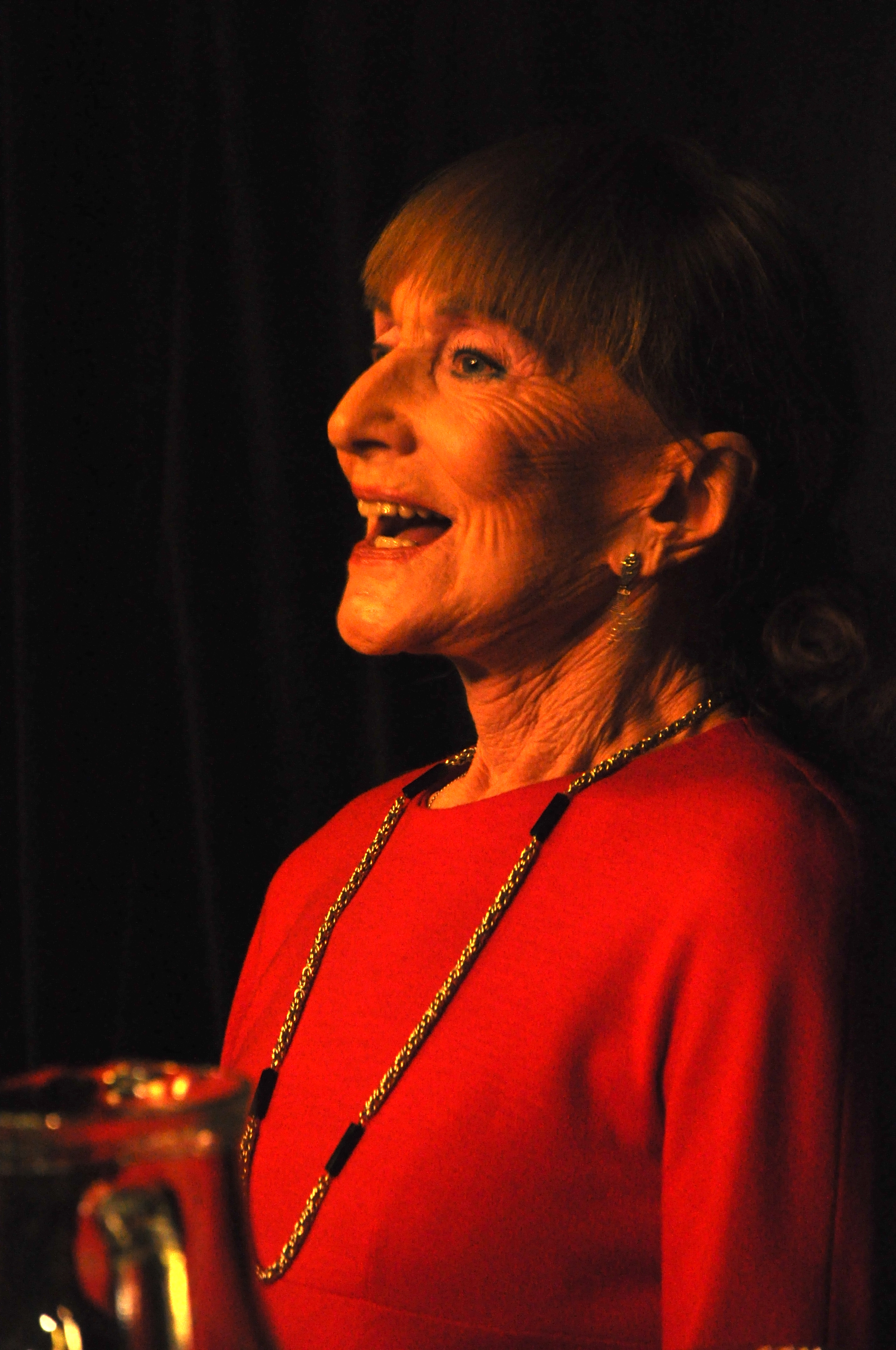 Beseda s paní Soňou Červenou. Festival Moje 20. století, Brno, 27. listopadu 2012.